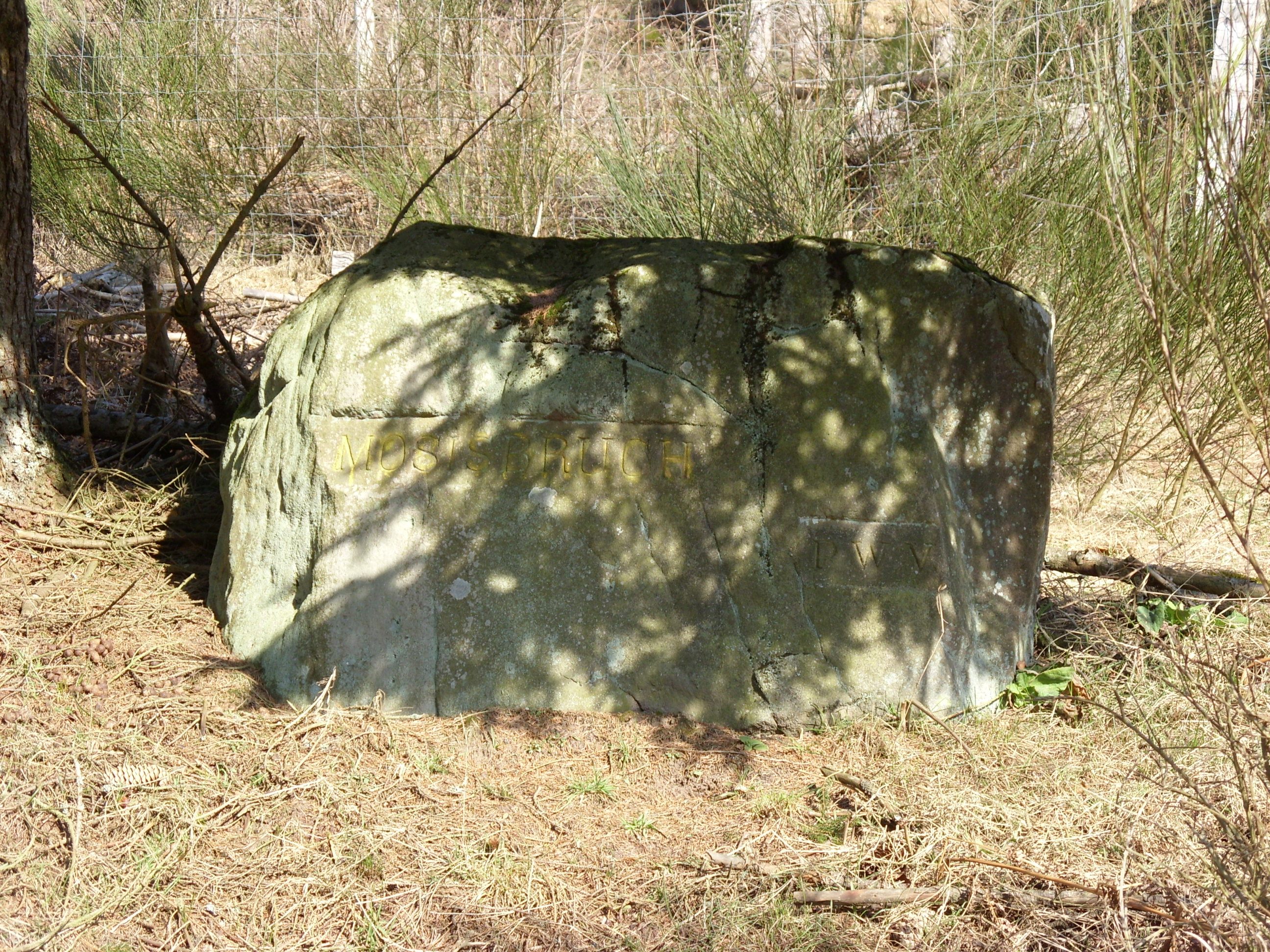 Ritterstein Mosisbruch